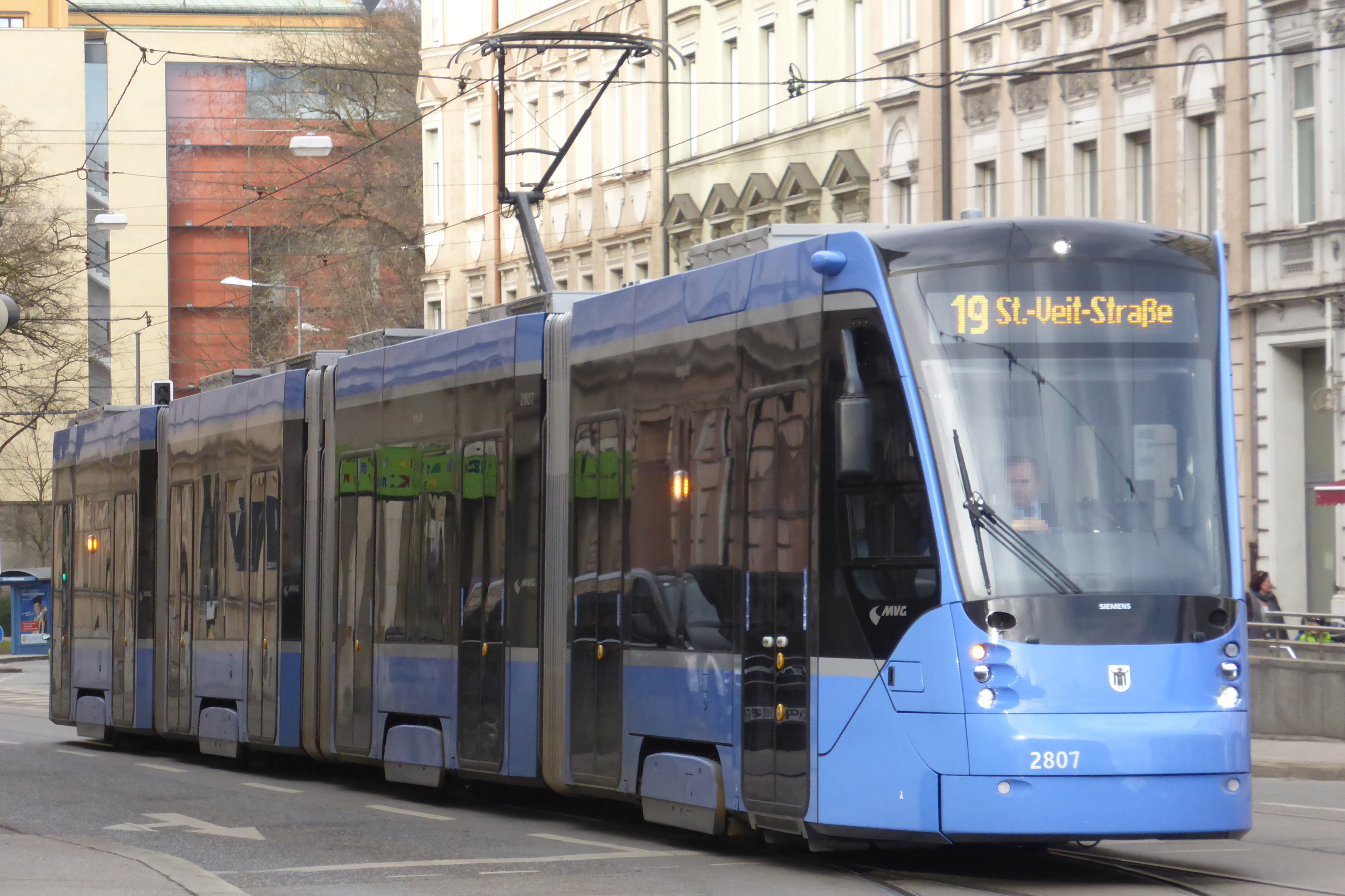 München, Siemens-Avenio-Straßenbahn am Max-Weber-Platz.